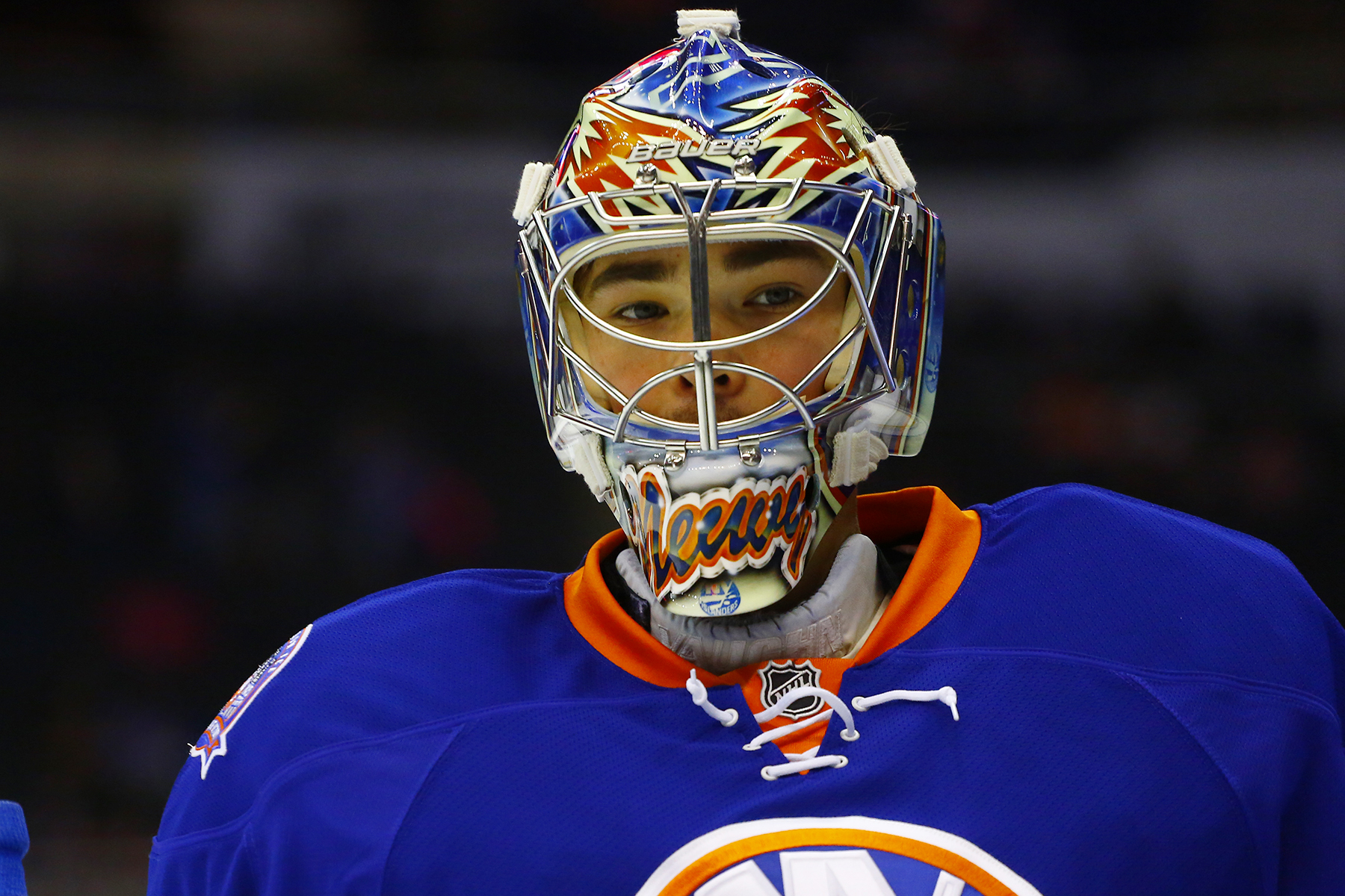 Hockey Game